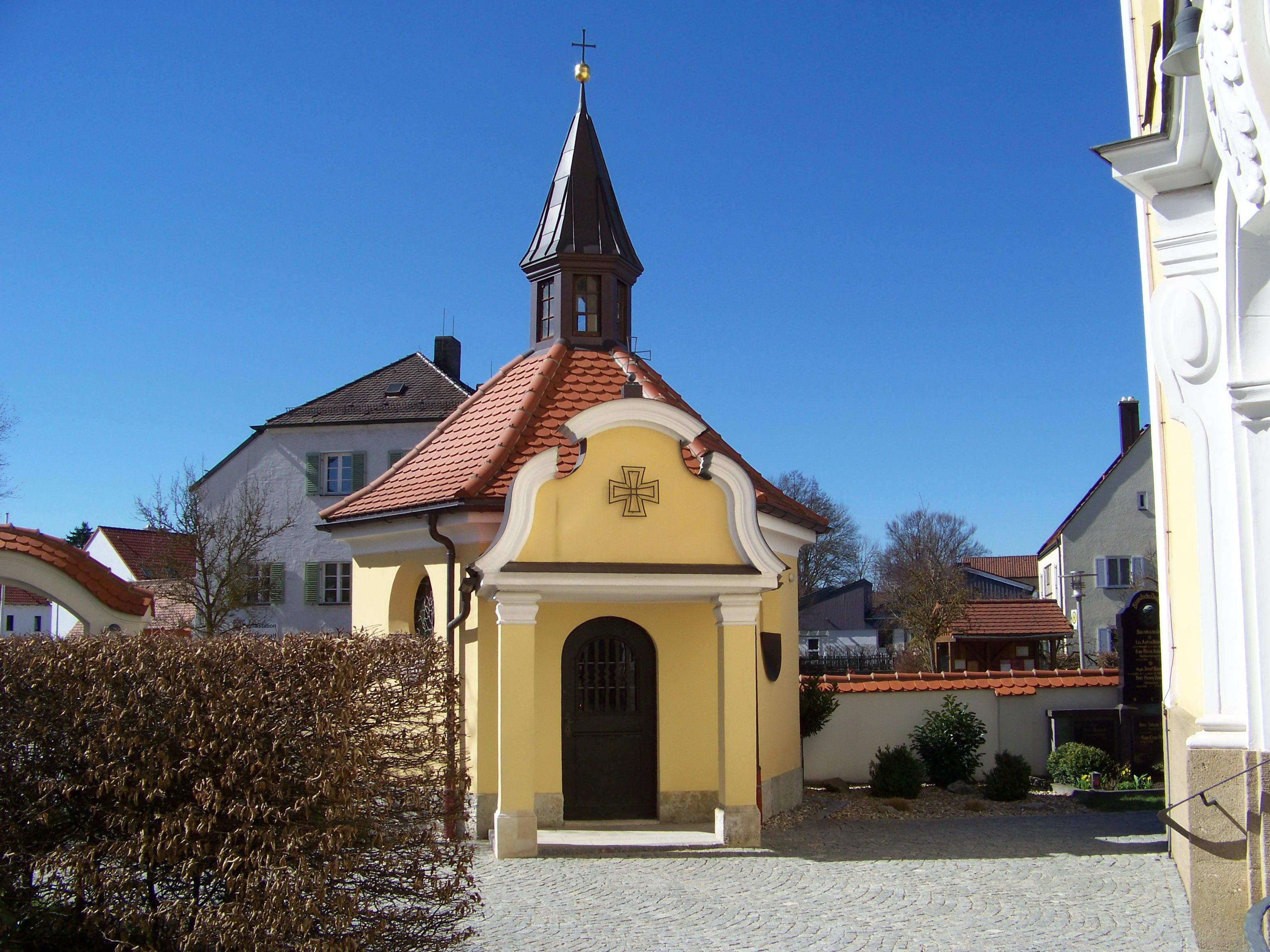 Kriegerkapelle zur Schmerzhaften Muttergottes, Achteckbau mit Vordach auf Pfeilern. Achteckiger Dachreiter mit Spitzhelm. Bau aus dem Jahr 1921 von Heinrich Hauberrisser; mit Ausstattung.